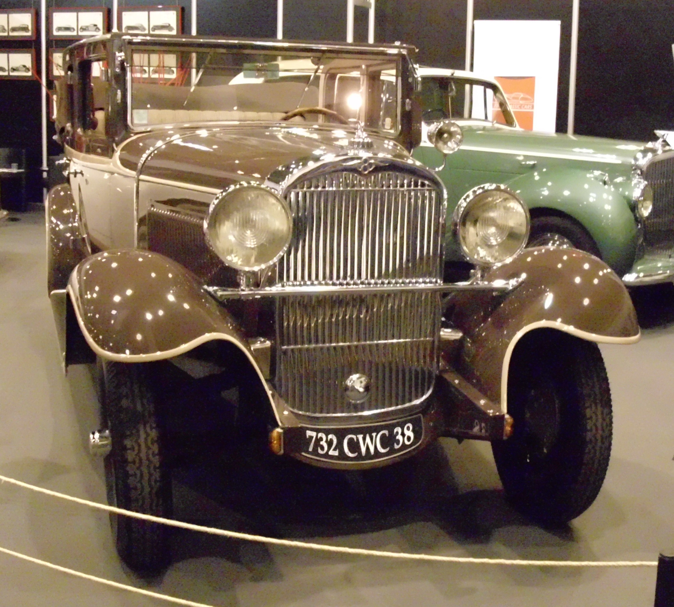 Röhr 8 RA Cabriolimousine von Autenrieth 1931